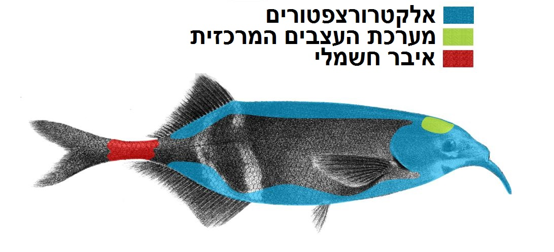 זַרְבּוּבָן מָצוּי (Gnathonemus petersii). צבע כחול: אלקטרורצפטורים. צבע ירוק: מערכת העצבים המרכזית. צבע אדום: איבר החשמל. Gnathonemus petersii (Günther, 1864) with the CNS shown in green, electroreceptors in blue and electric organ in red